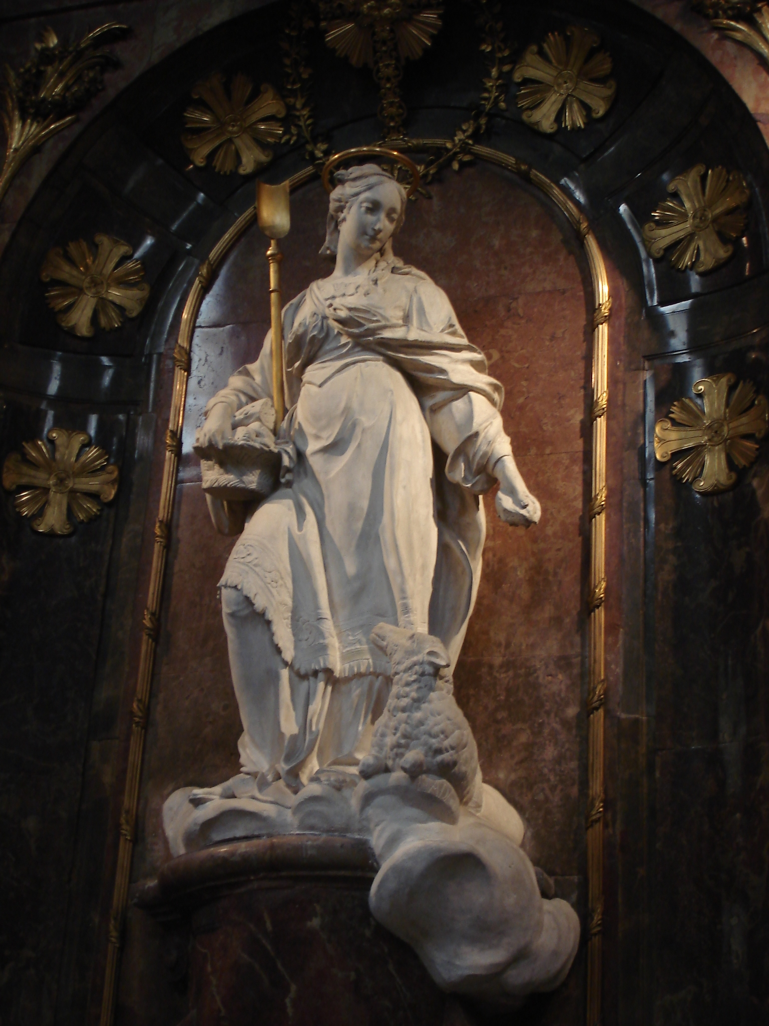 statue of Ste Genevieve by François Ladatte in Église Saint-Louis-en-l'Île (Paris)